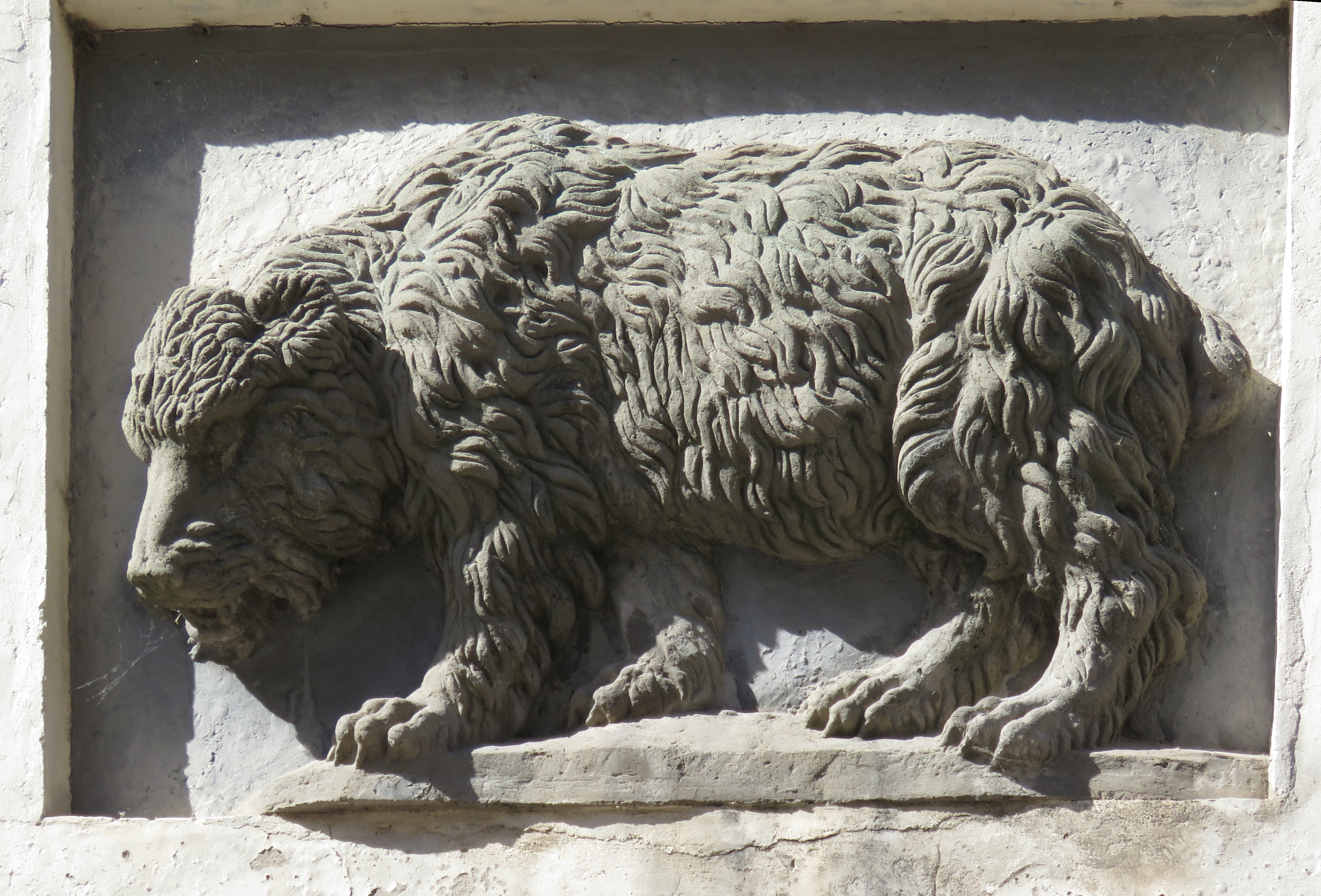 Baudenkmal in Stralsund, erh. Bärenapothek